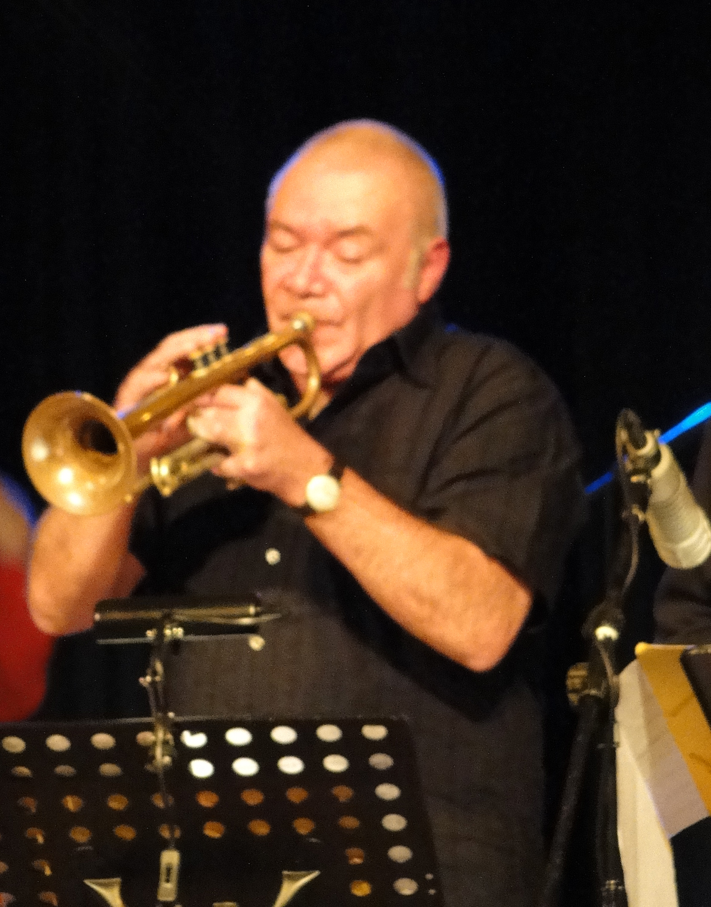 Reiner Winterschladen, als Mitglied des "Ekkehard-Jost-Oktetts", auf dem Hofheimer Jazz Festival 2009.